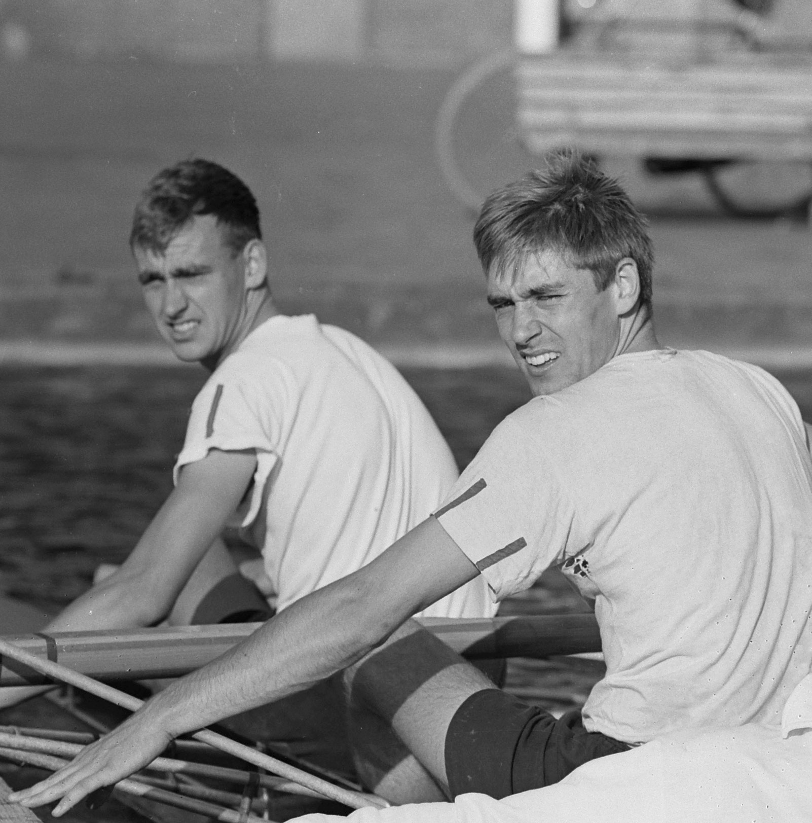 Roeienkampioenschap van Nederland op Bosbaan. De twee met stuurman na de finish met Castelein, Wartena en stuurman van Dam